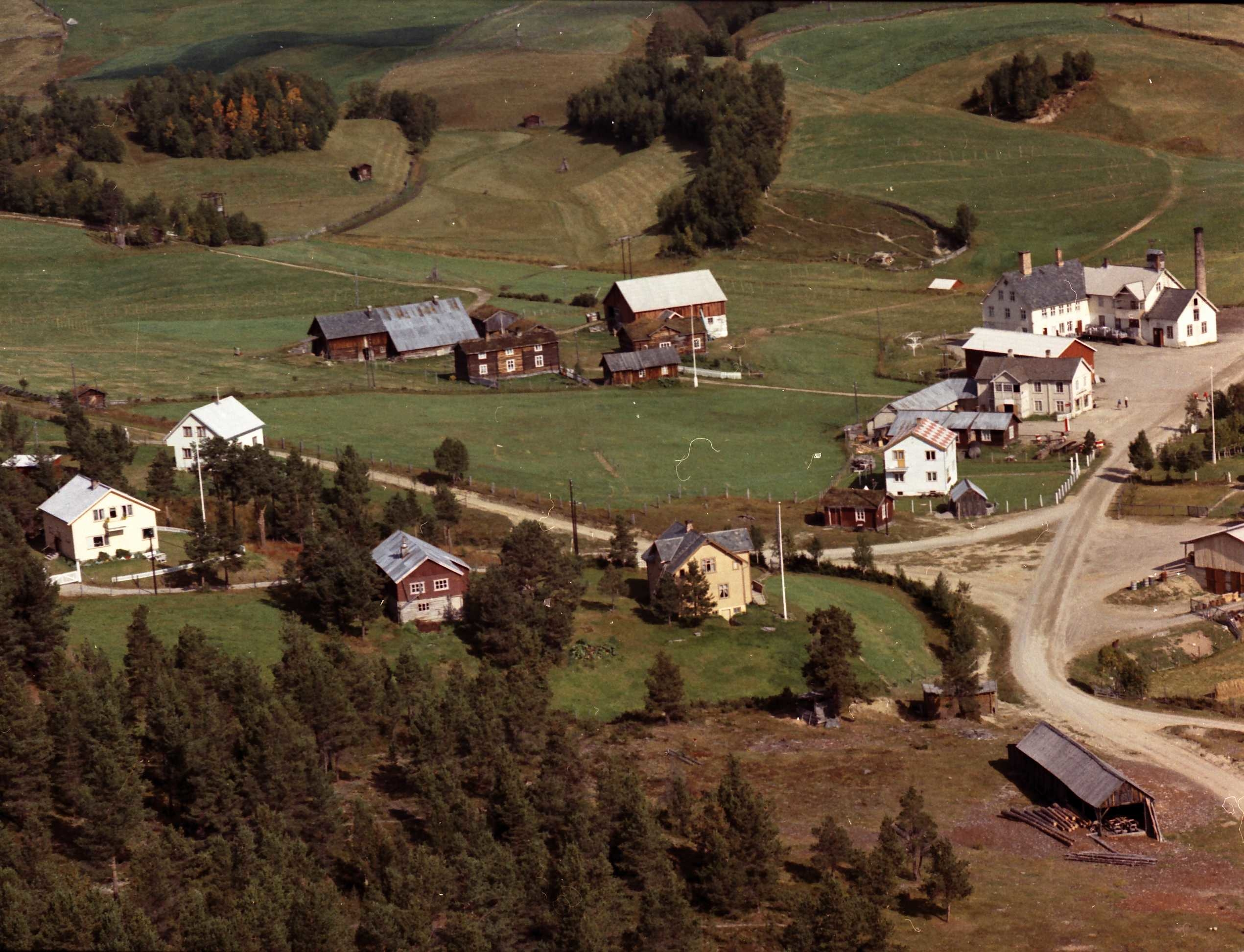 Deler av Dalsbygda i Nord-Østerdalen